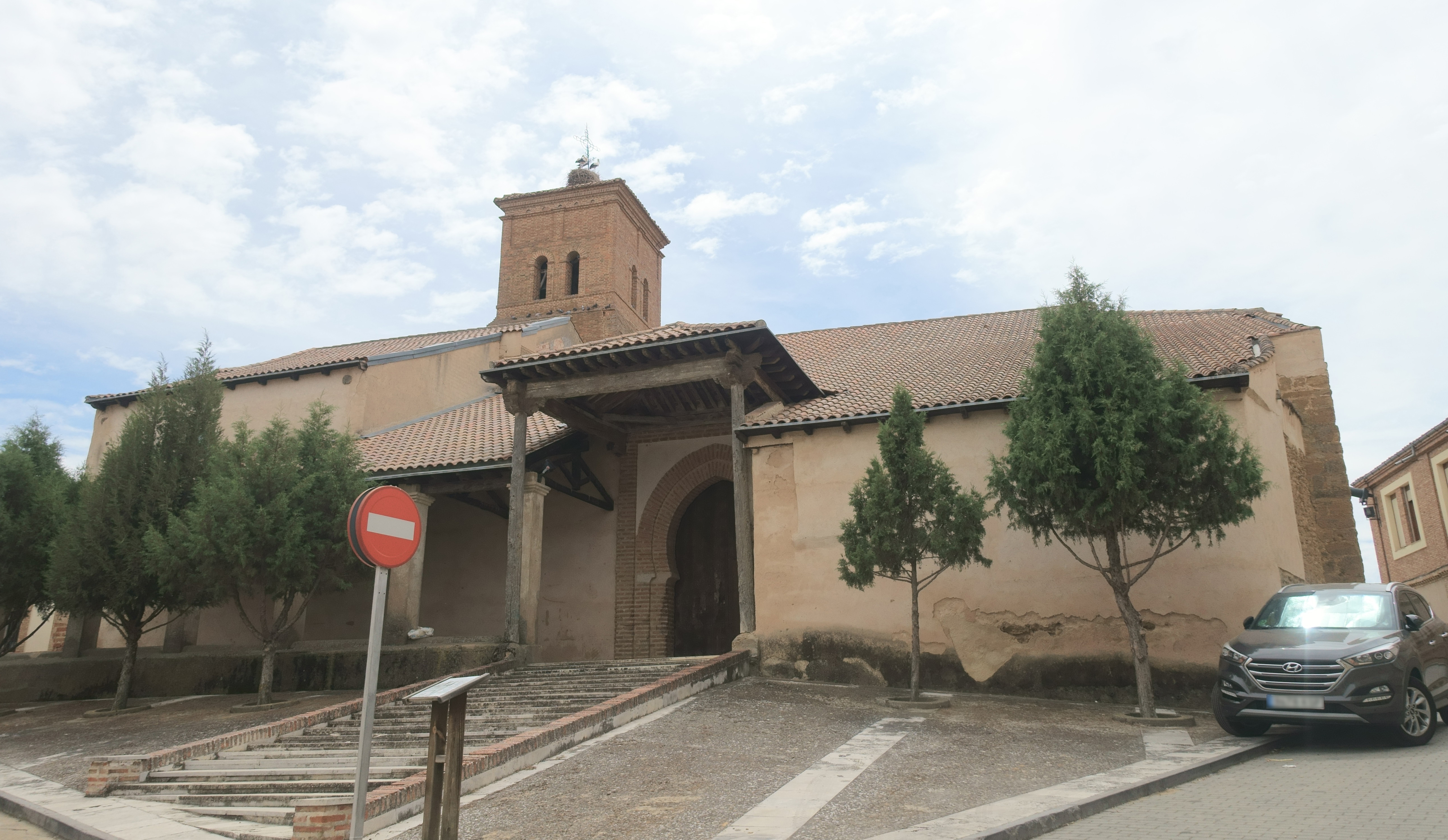 Iglesia de Santa Marina, Mayorga (Valladolid, España).